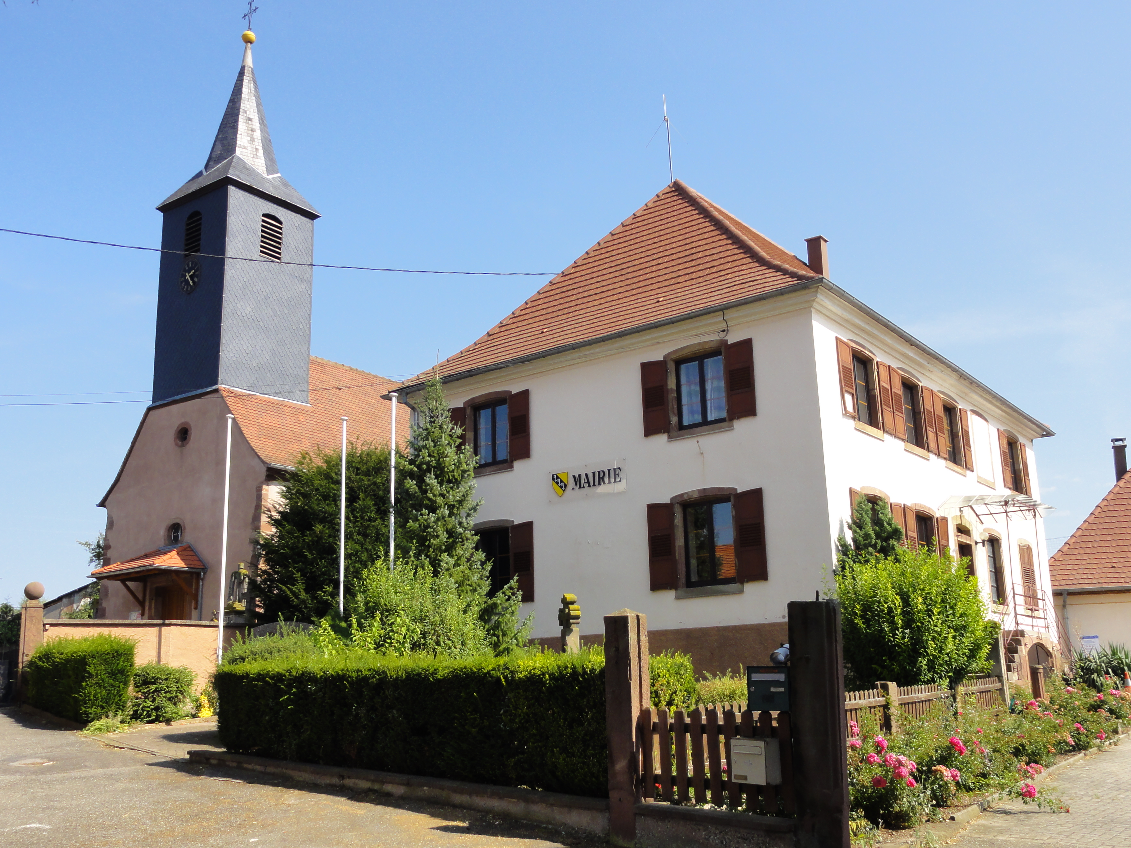 Alsace, Bas-Rhin, Dossenheim-Kochersberg, Mairie et Église Saints-Pierre-et-Paul: .